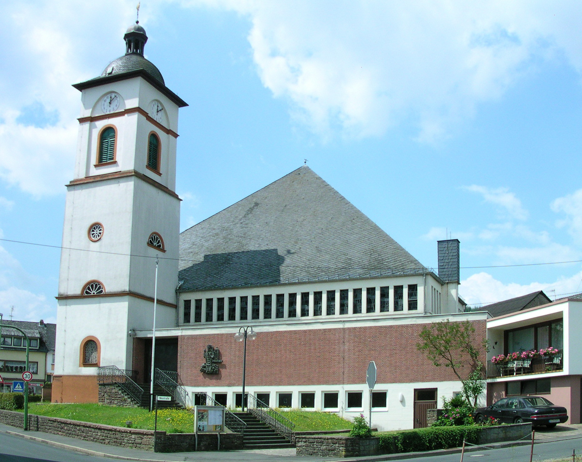 katholische Pfarrkirche St. Nikolaus in Birresborn, Rheinland-Pfalz